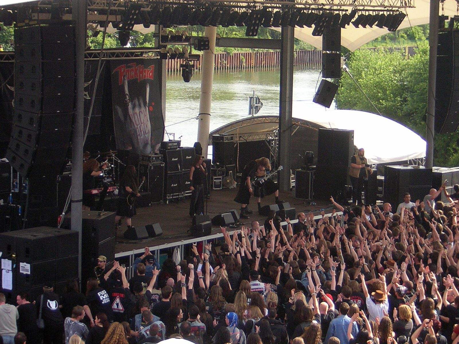 Bühne und Publikum beim „Rock Hard Festival“ 2006. Die Band auf der Bühne ist Finntroll